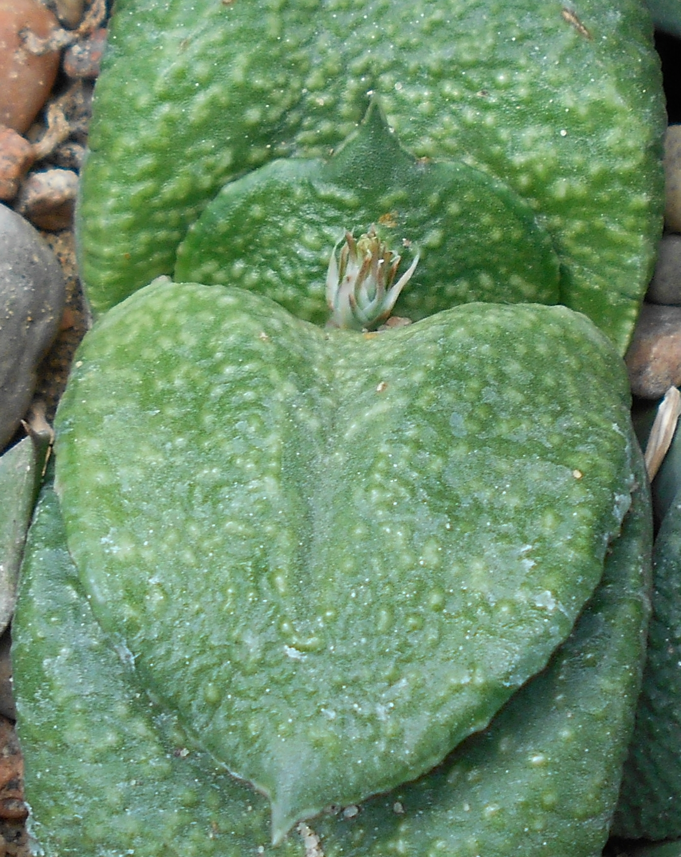 Gasteria armstrongii, Ogród Botaniczny UMCS w Lublinie